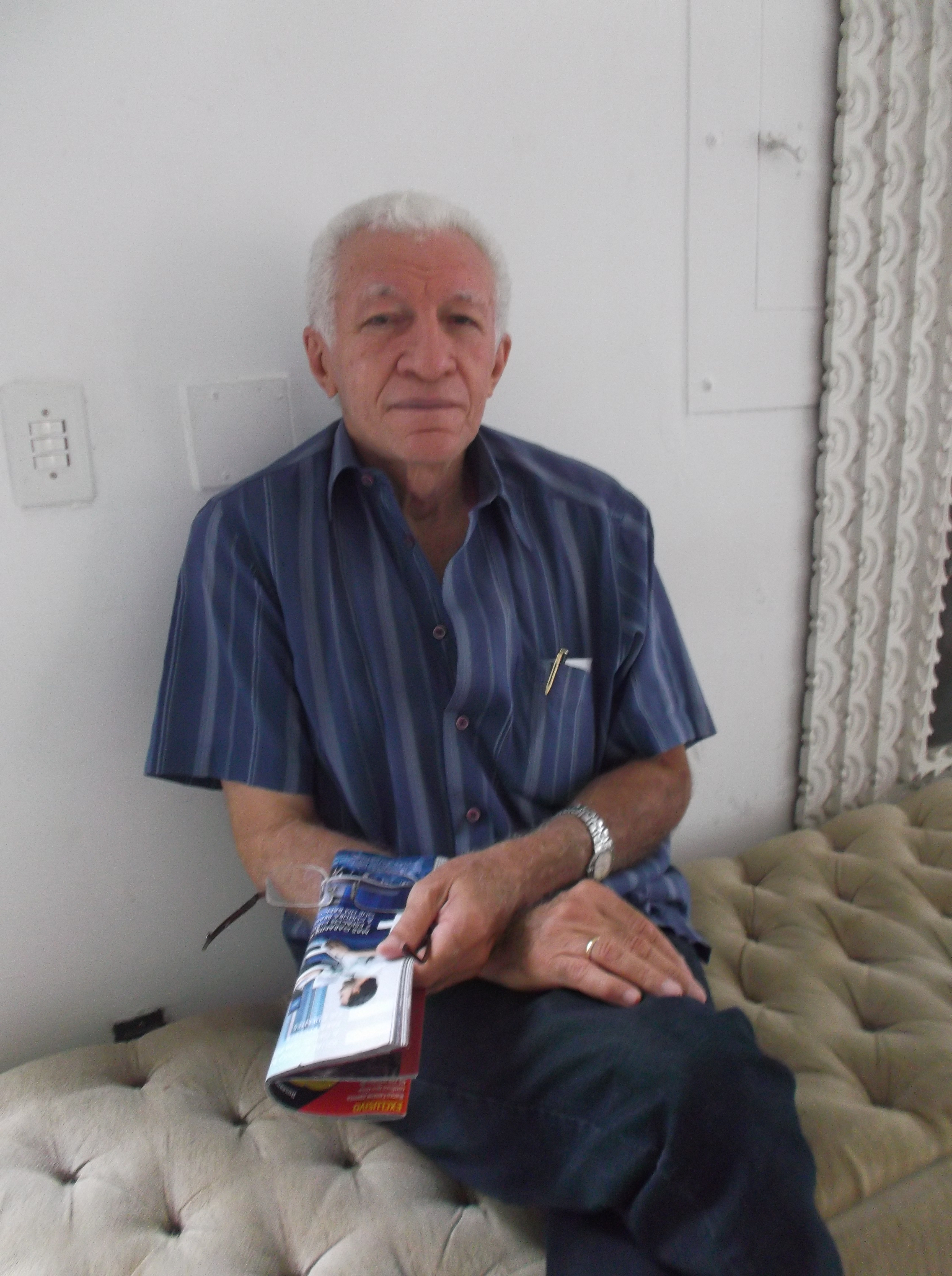 Profesor, escritor e apresentador de TV Cineas Santos